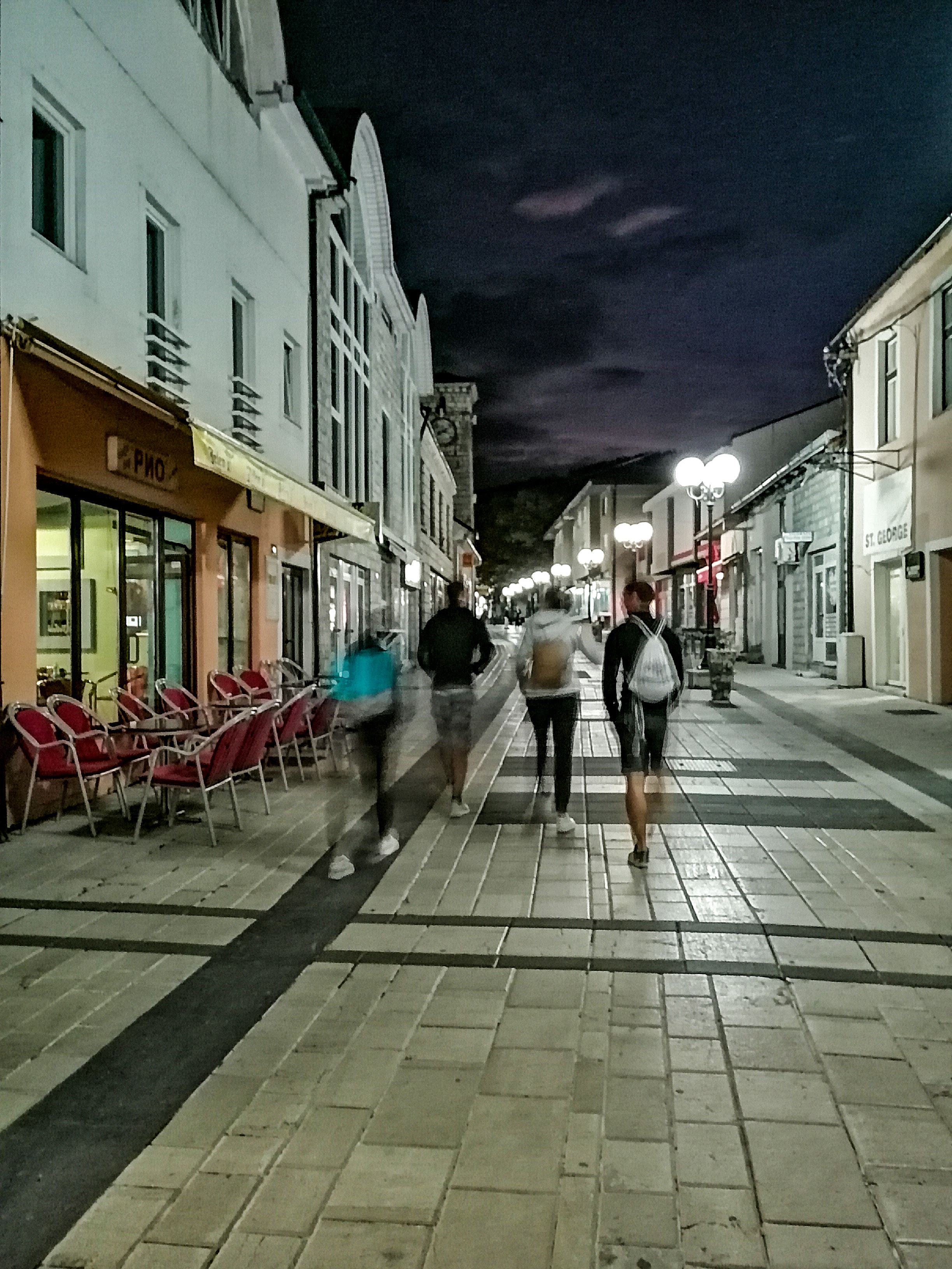 Srpski (latinica): Nevesinje